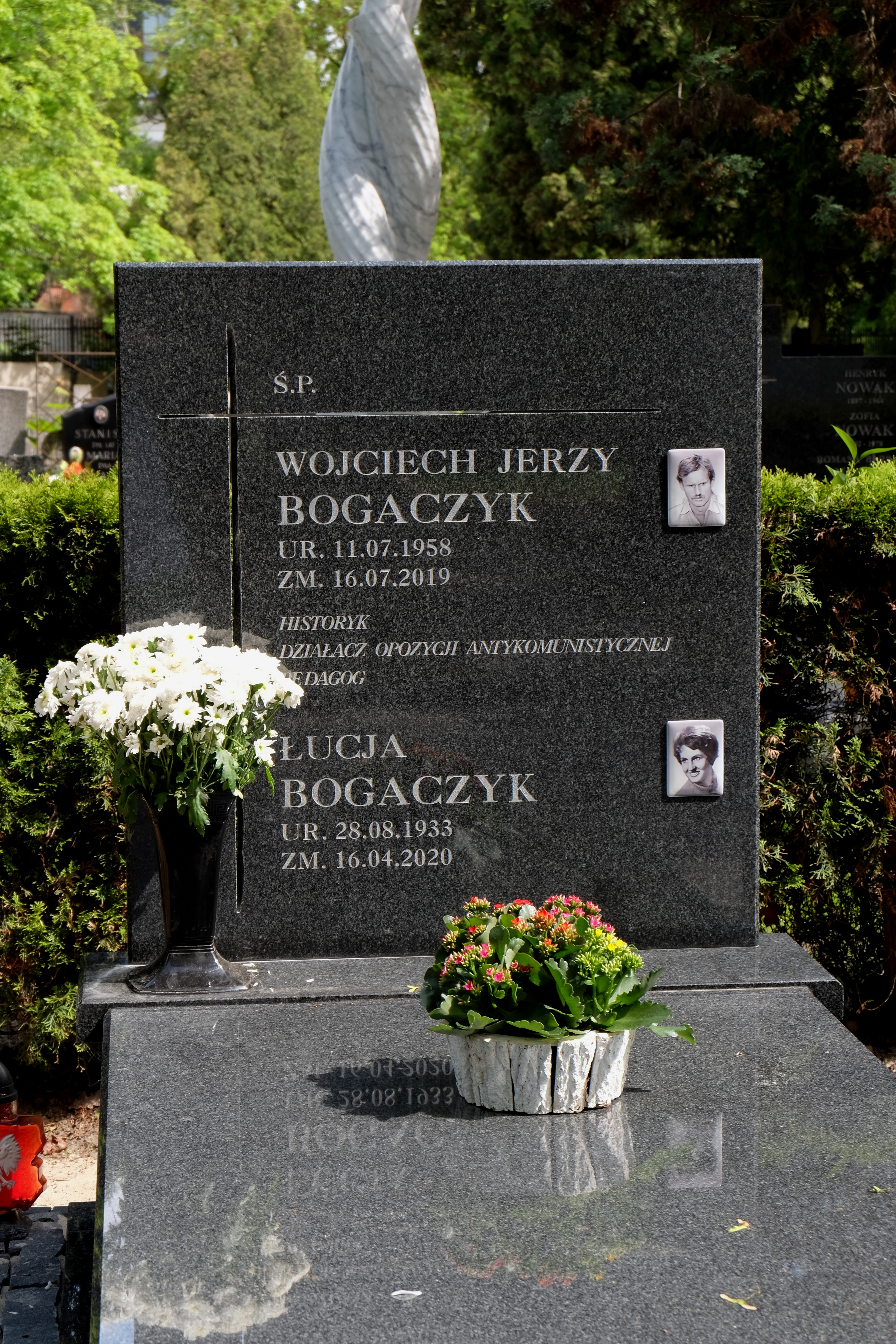 Grób opozycjonisty Wojciecha Bogaczyka na Cmentarzu Wojskowym na Powązkach w Warszawie